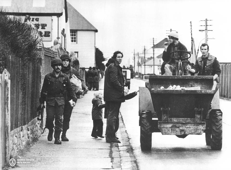 Malvinas. Ciudadanos ingleses y soldados argentinos durante los días de guerra, año 1982. AGN_DDF/ Caja 3534, inv: 336640. Fuente: Agn Argentina Efemérides